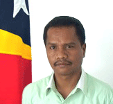 Aniceto Guterres Lopes, Abgeordneter aus Osttimor